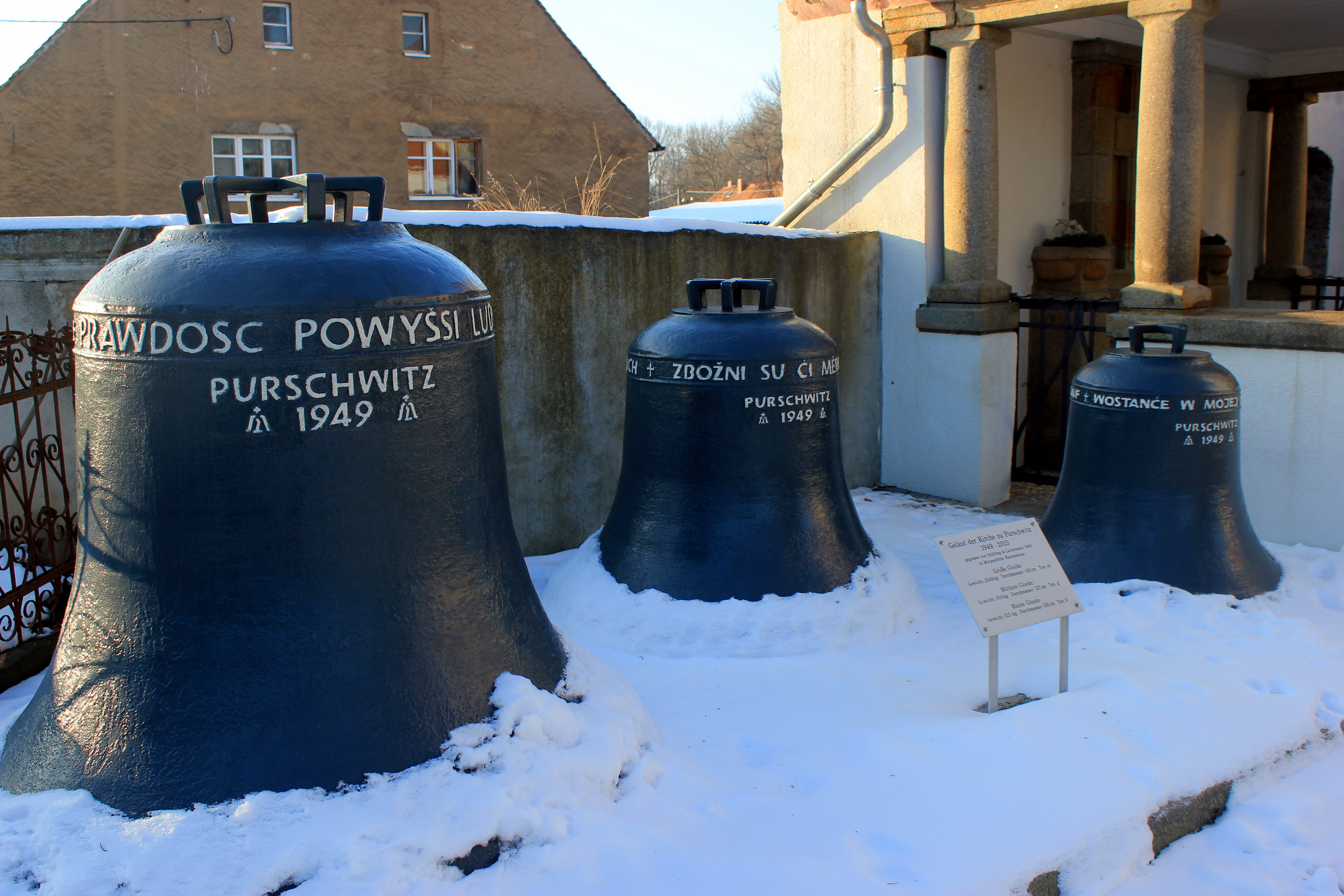 Hornjoserbsce: Stare cyrkwinske zwony na kěrchowje w Poršicach.